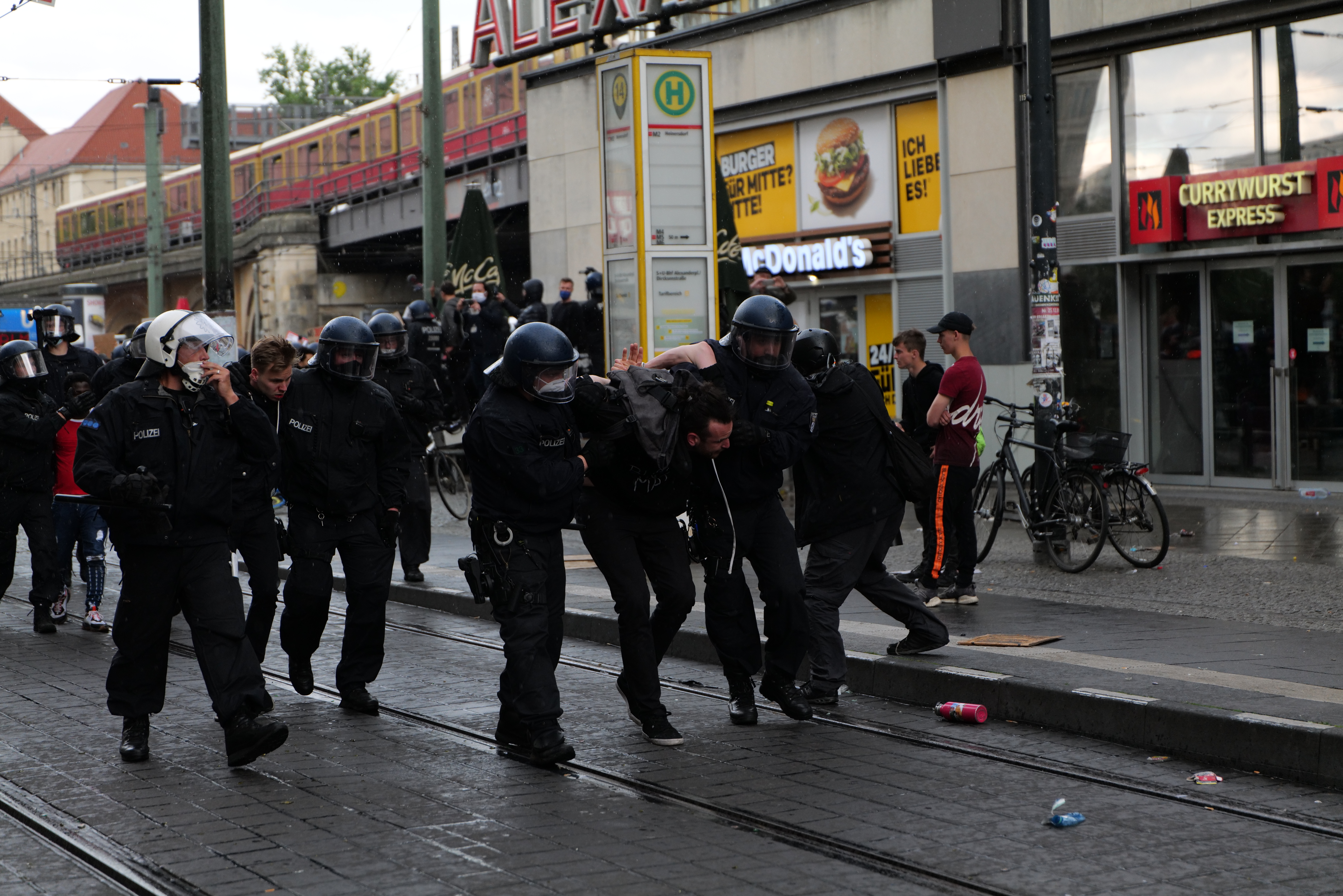 BlackLivesMatter Kundgebung am Alexanderplatz in Berlin am 6. Juni 2020.